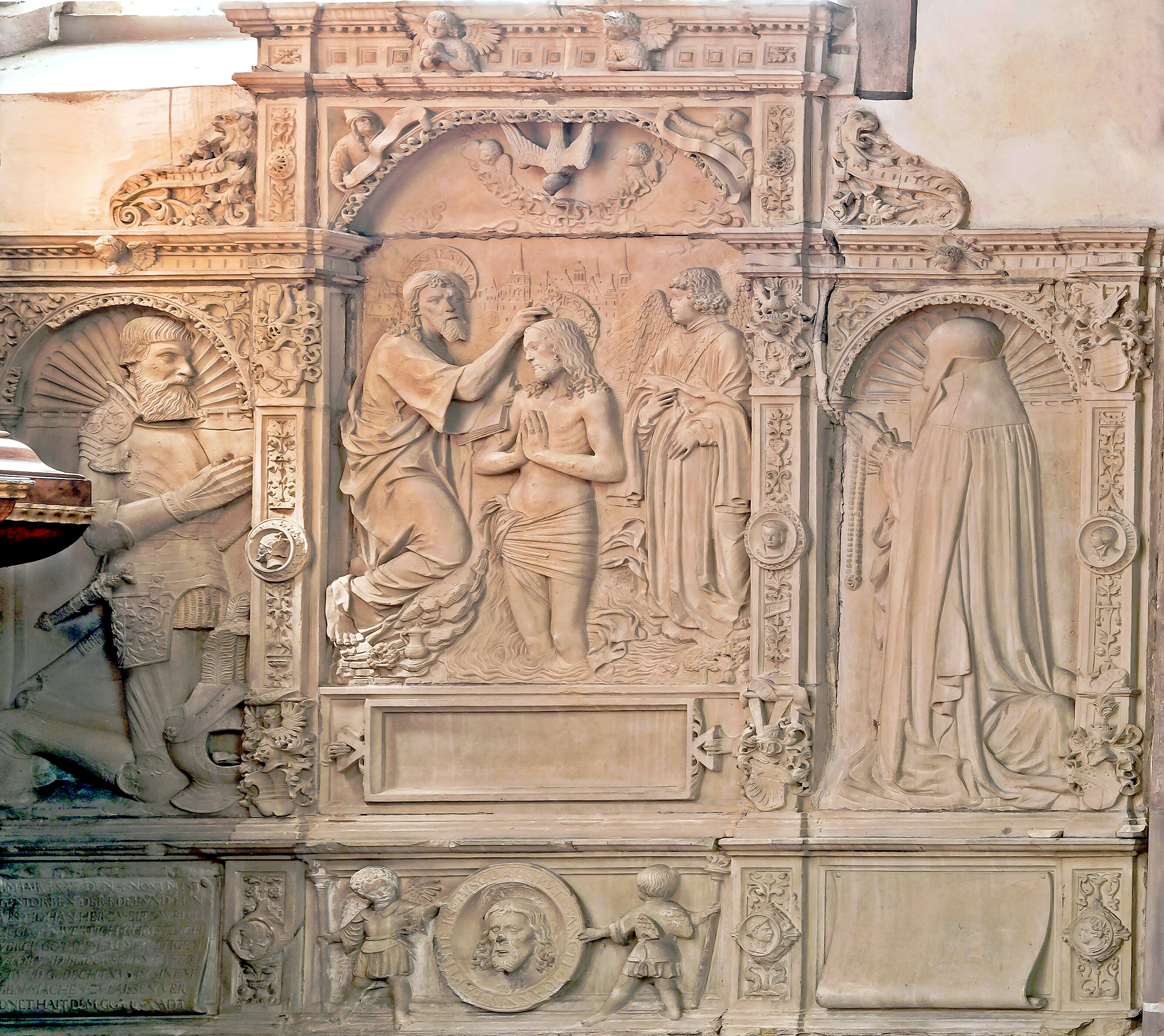 Das dreiteilige Wandgrab des Johann von Eltz und seiner Gemahlin Maria von Breidbach-Bürresheim von 1548 gehört zu den Hauptwerken der Bildhauerkunst der deutschen Renaissance. Im mittleren Feld ist die Taufe Christi dargestellt.